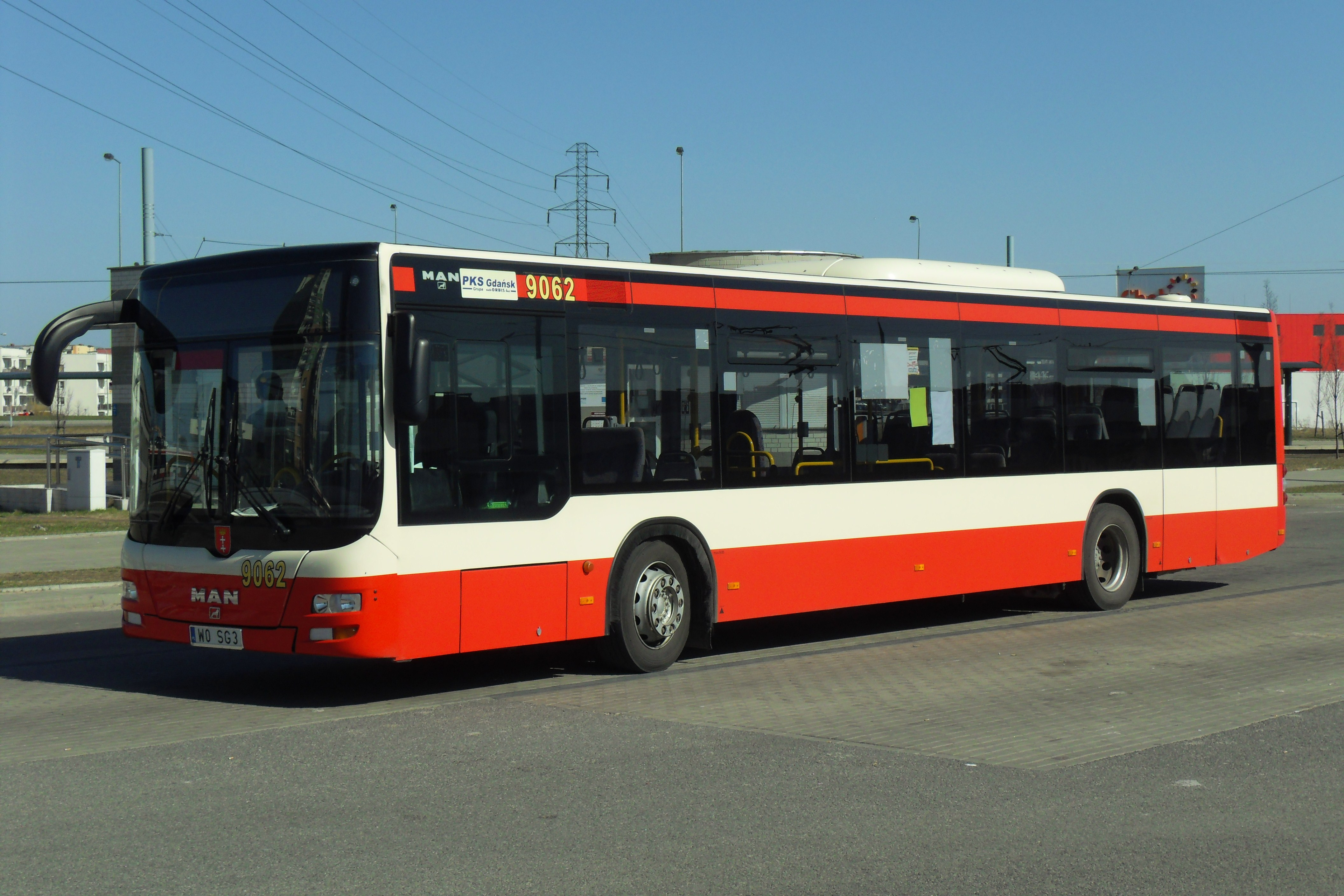 Gdańsk Chełm. Autobus MAN #9062, PKS Gdańsk.